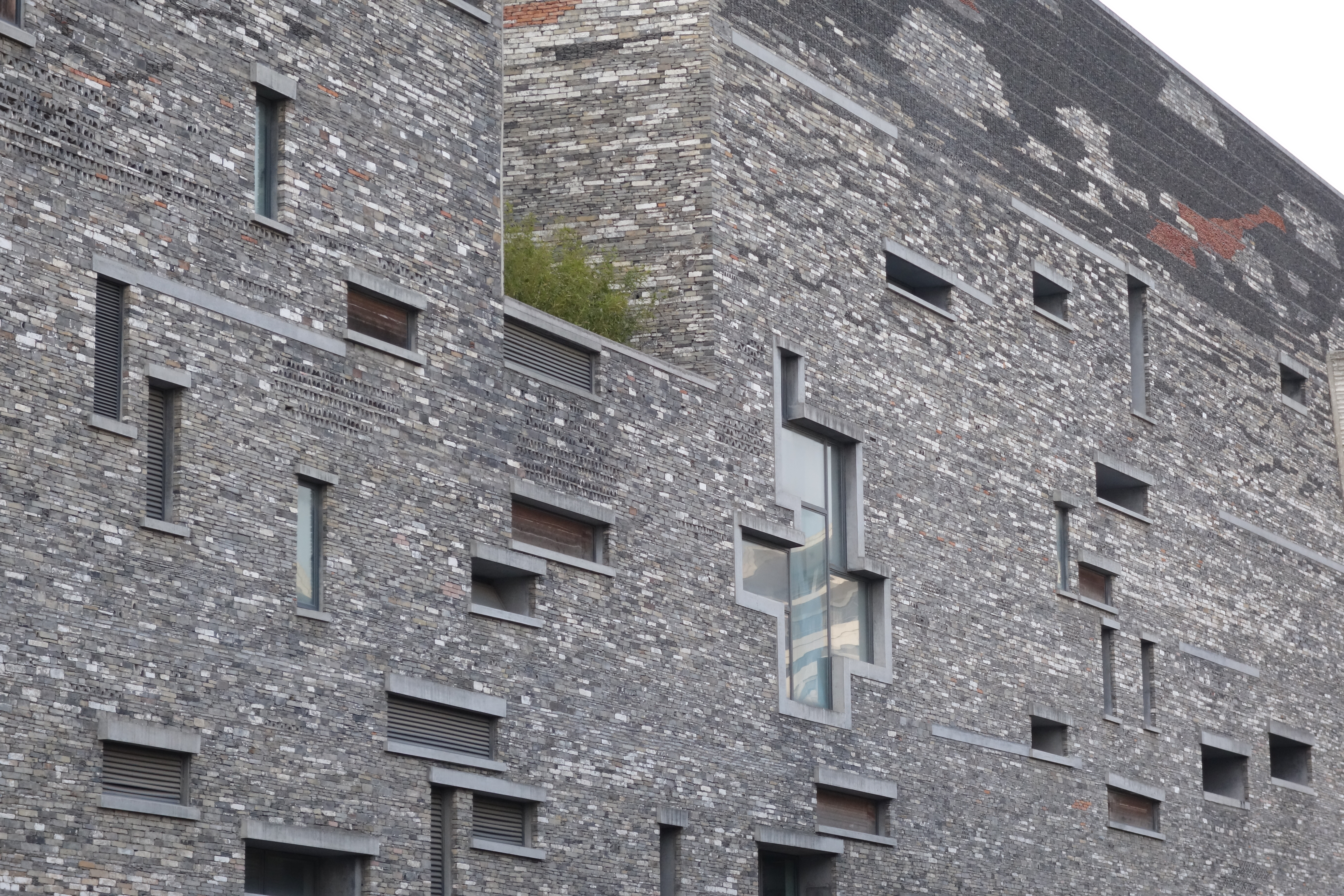 宁波博物馆窗户设置